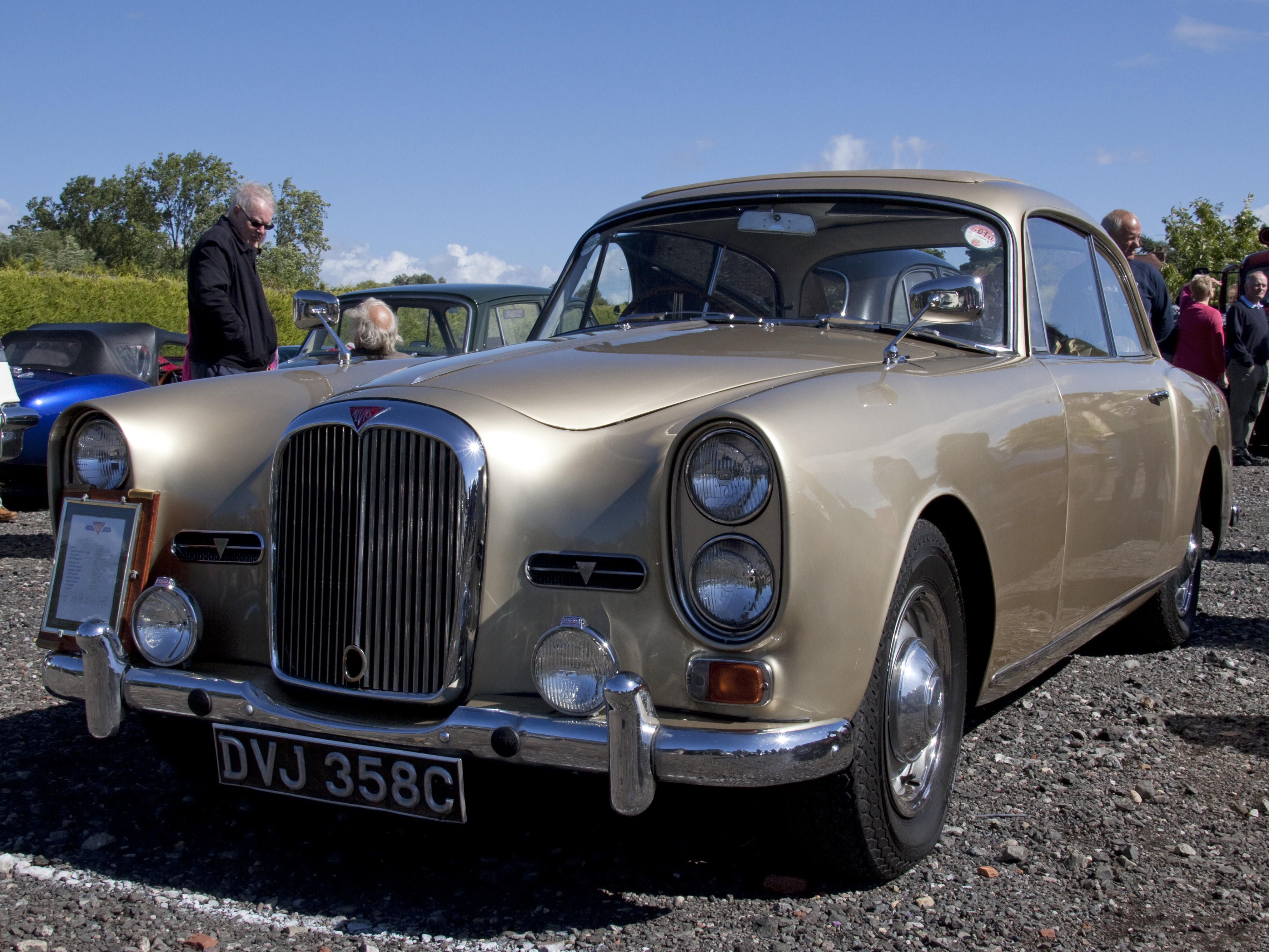 Alvis 1965 TE21 Saloon